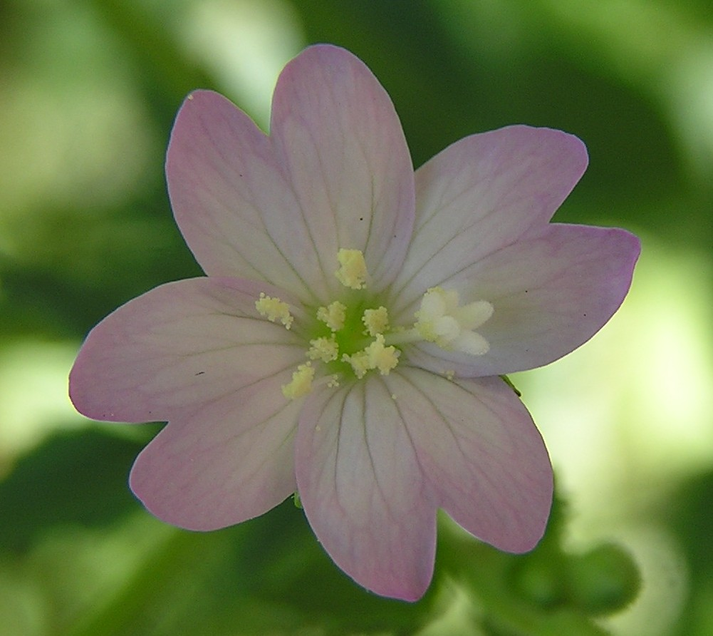 Blüte des Berg-Weidenröschens (Epilobium montanum) in Bonn.